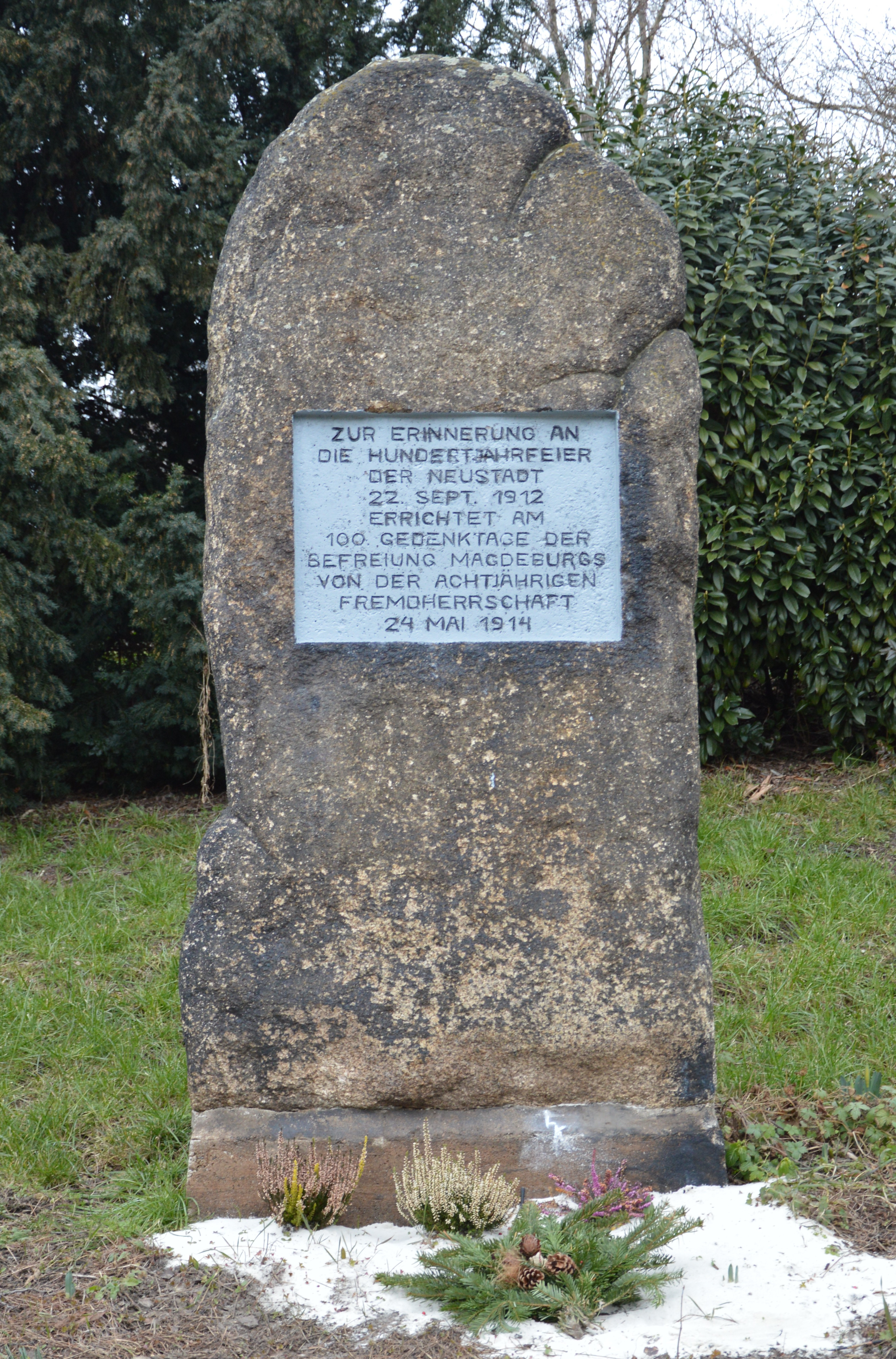 Denkmal Alte Neustadt